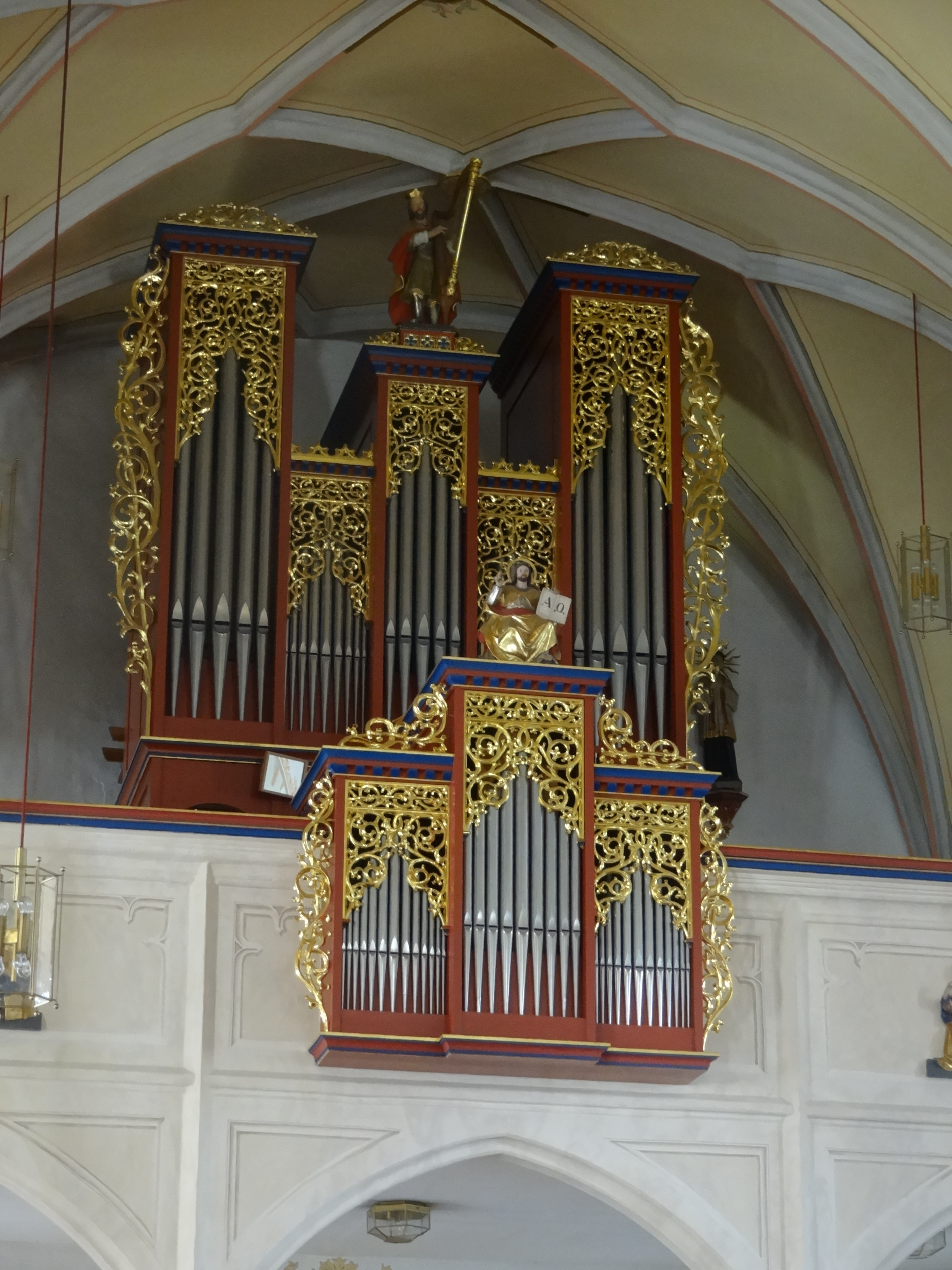 Orgel (II/P, 21) der röm.-kath. Pfarrkirche St. Georg in Gerzen (Lkr. Landshut, Bayern)